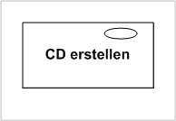 Anwendungsfall (UML2) - Beispiel 5